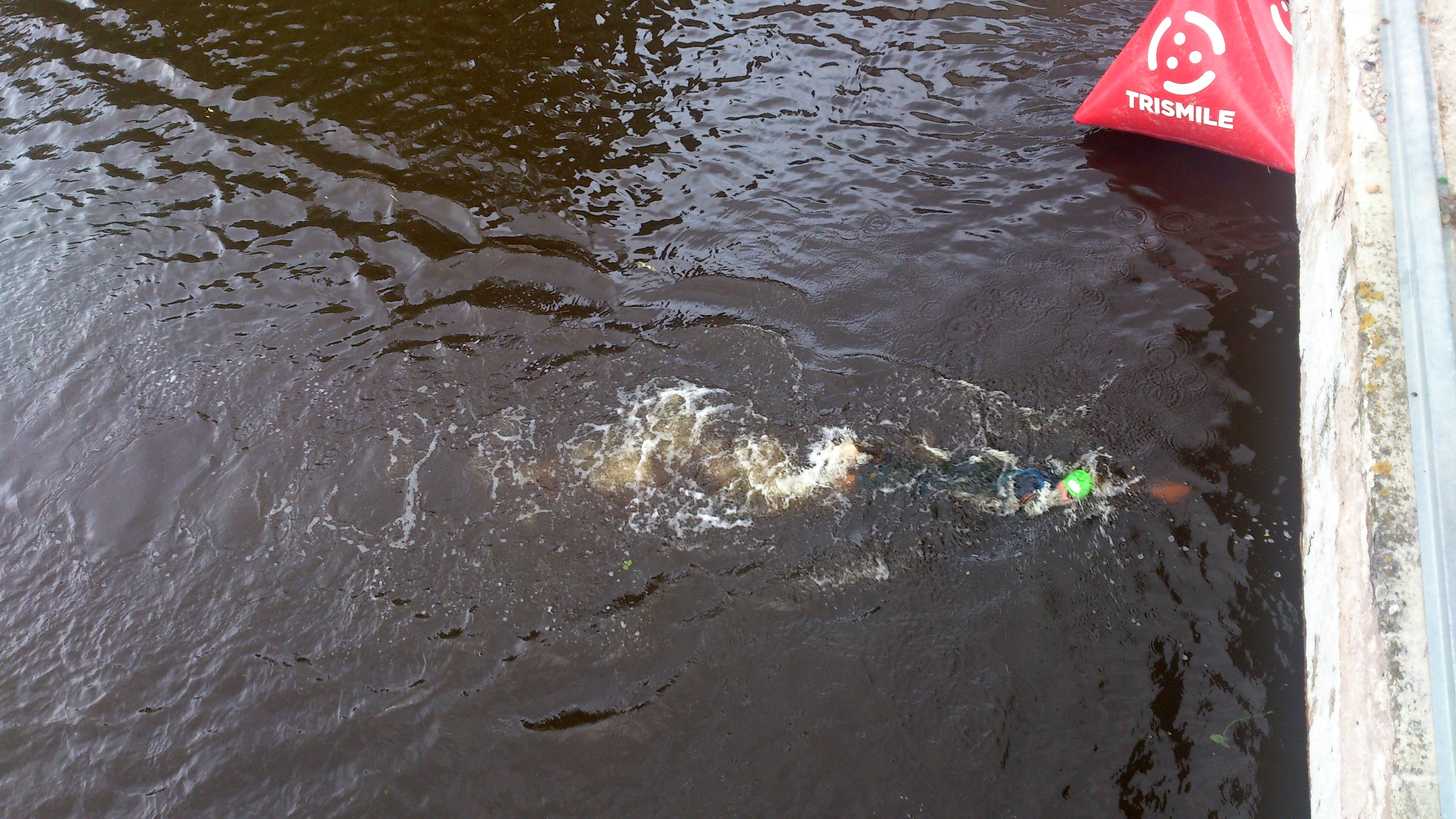 Ujuja Tartu Mill Triathlonil 2014 Tartu hansapäevade ajal